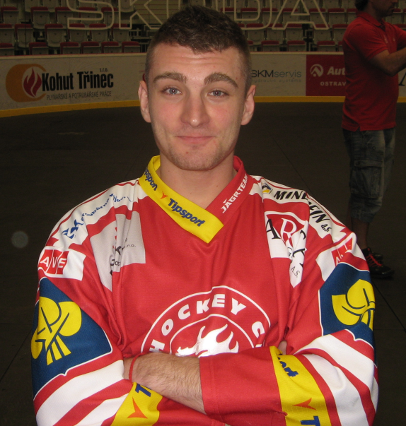 Po zakončení sezóny 2014/15 ve Werk Areně